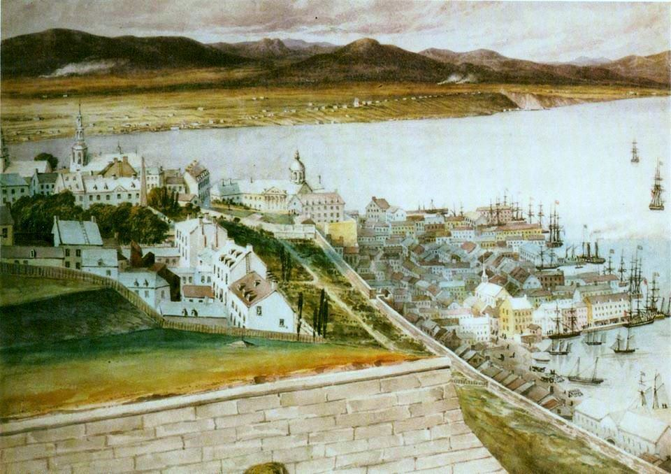 Québec en 1836, aquarelle de P.J. Bainbridge « Cette aquarelle nous permet de découvrir Québec en 1836. Cette vue depuis la citadelle nous permet d’abord d’observer le mur de fortification sur lequel sera assise la terrasse Dufferin lors de sa construction en 1879. Le château Saint-Louis est absent du décor ayant été détruit par les flammes deux ans auparavant. Toutefois, derrière le monument de Wolfe-Montcalm, on peut voir le Château Haldimand construit en 1784. C’est à cet endroit que sera édifié le Château Frontenac à partir de 1892. Immédiatement à l’arrière se trouve l’église Notre-Dame de Québec et, à l’extrême gauche, on reconnaît la cathédrale anglicane Holy Trinity. À l’endroit où se trouve aujourd’hui le parc Montmorency, on aperçoit le premier parlement dont la construction a été achevée en 1834. L’édifice est reconnaissable à sa coupole. Il sera détruit par un incendie survenu le 1er février 1854. En basse-ville, on peut voir l’église Notre-Dame-des-Victoires et l’anse Cul-de-Sac. C’était l’époque où le port se transformait en une forêt de mâts. Enfin, à l’arrière-plan, on devine le chemin Royal et son chapelet de petites maisons qui s’étire sur la côte de Beaupré. » – Société historique de Québec